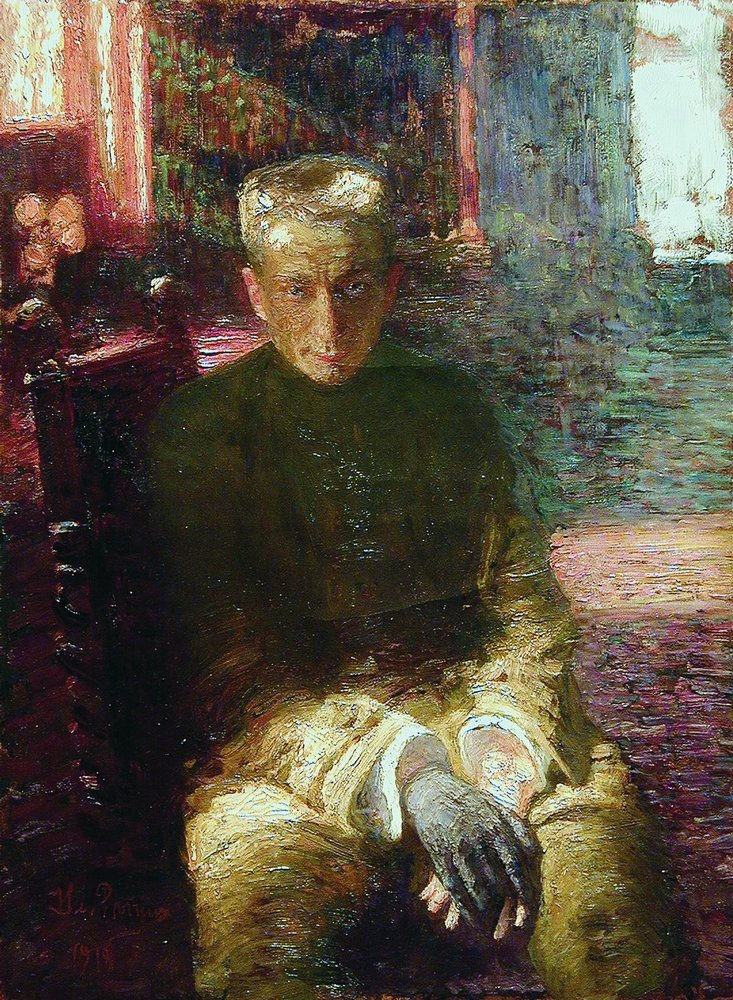 А. Керенский